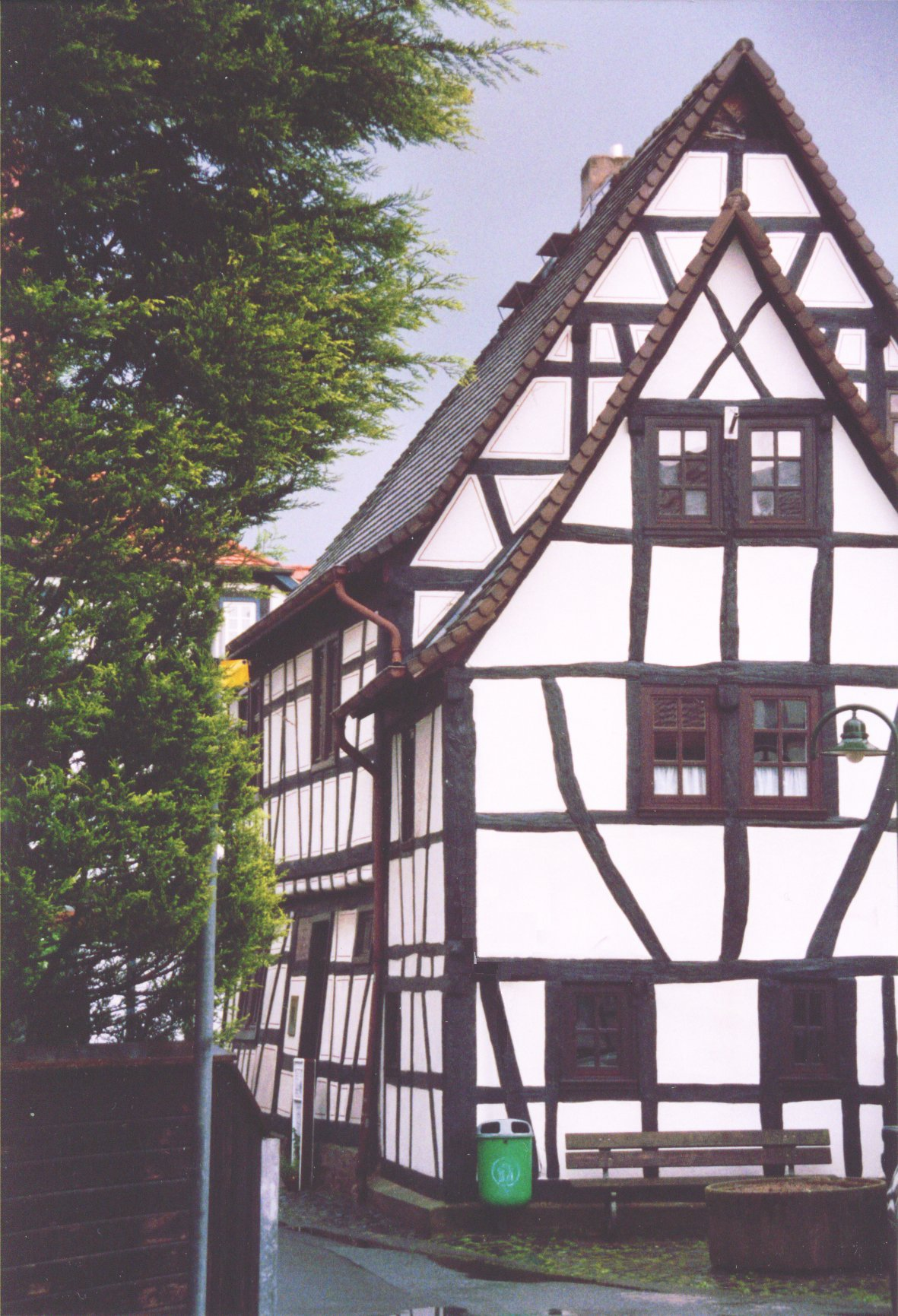 Museum Ludwig Erk-Haus, Dreieich. Das Gebäude wurde 1618 als Bader-Haus errichtet.